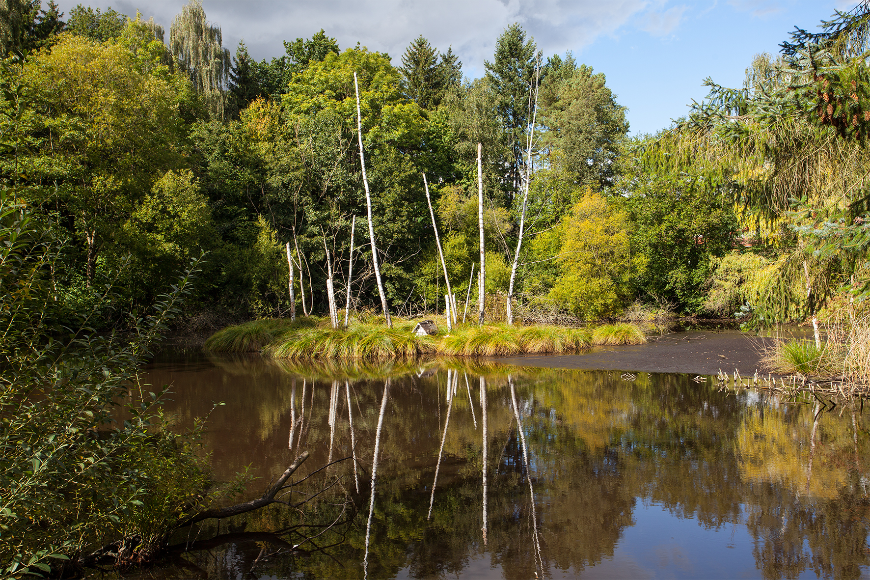 Erdfall mit Torfmoor in Bad Seebruch (Vlotho-Valdorf), Kreis Herford